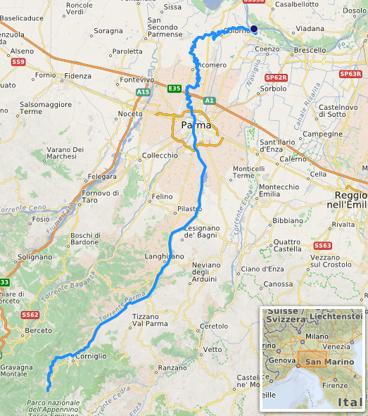 carte réalisée sur umap [1] This map may be incomplete, and may contain errors. Don't rely solely on it for navigation.